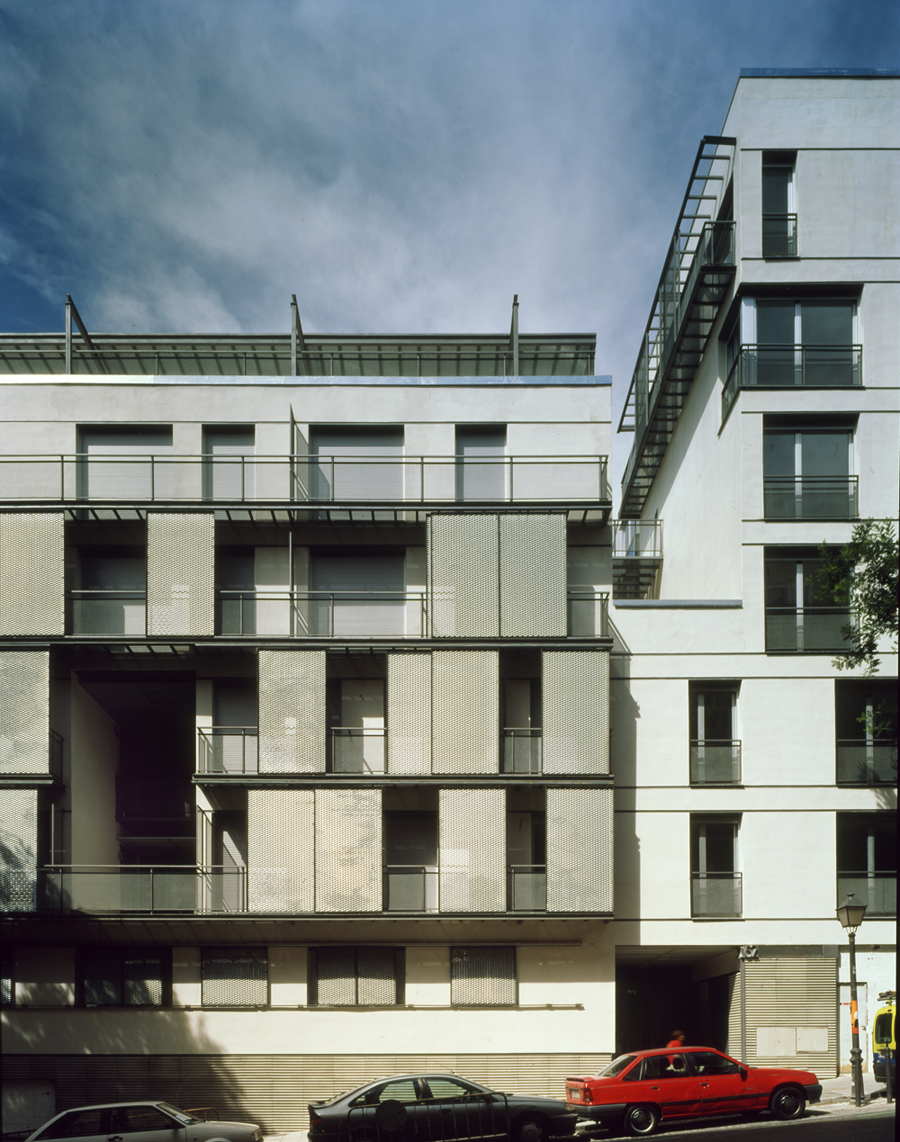 Vista este desde la calle Embajadores